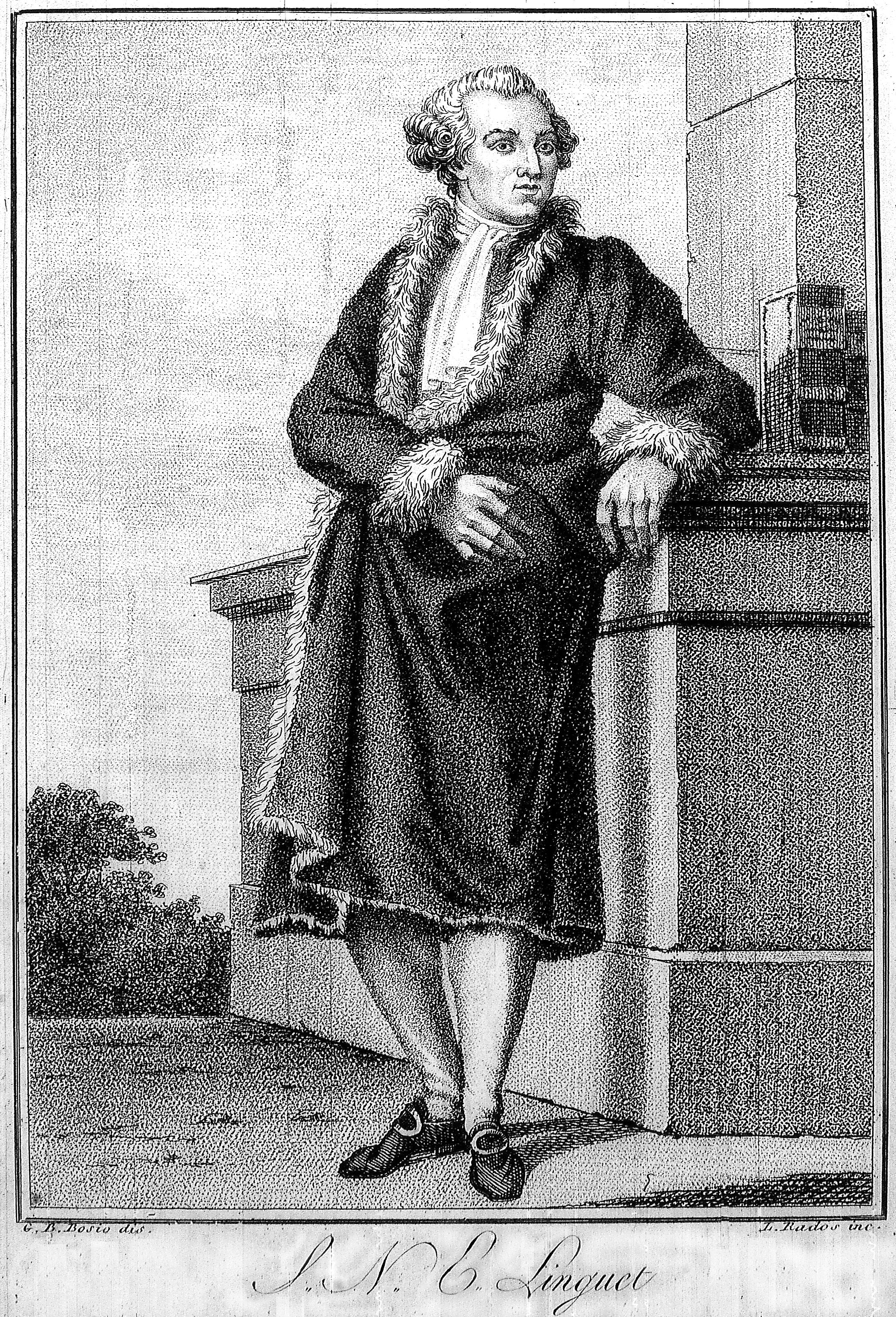 issue de la bibliothèque de reims. Boscio & Rados pour la gravure et l'impression.